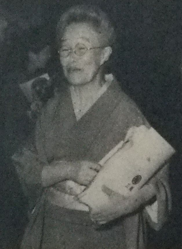 安藤幸（ユーディ・メニューイン訪日公演時）